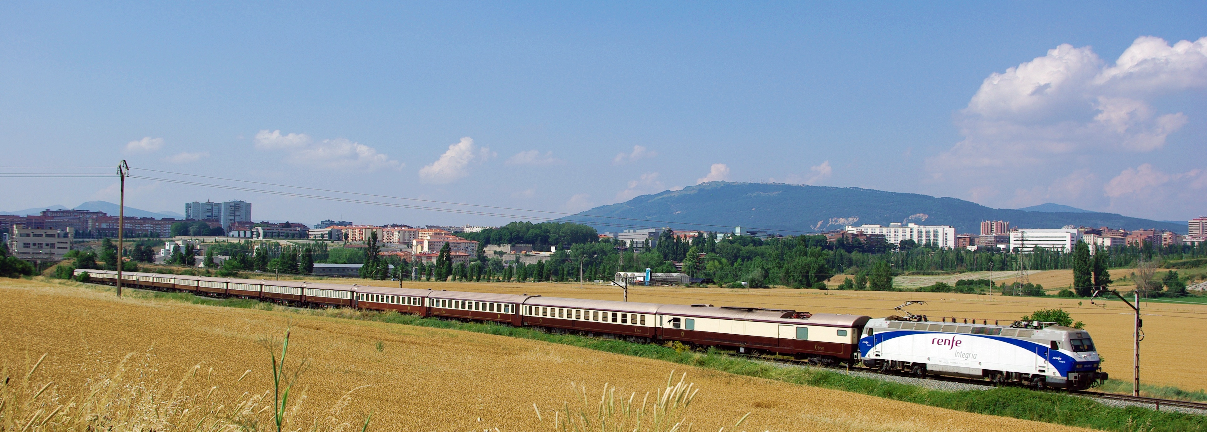 Sabía que era bonito, pero no tanto. Hoy como un reloj suizo marchaba el fantástico tren turístico Al-Andalus por tierras navarras, a las 16:55 salía de Pamplona con destino Tafalla y alrededor de las 17:00 pasaba a buena marcha por Etxabakoitz, justo a la salida del apeadero (recientemente ya sin servicio) de Cizurmayor con la 252 013 en colores Grandes Líneas y logos de Integria, no es una doble de 319, pero no le queda lejos :). Gracias a los que me han avisado por los horarios. PD: Este sitio fue buscado a la desesperada 15 minutos antes de que llegara el tren, pues yo estaba en el puente que se e al fondo a la izquierda :d Un Saludo y gracias!